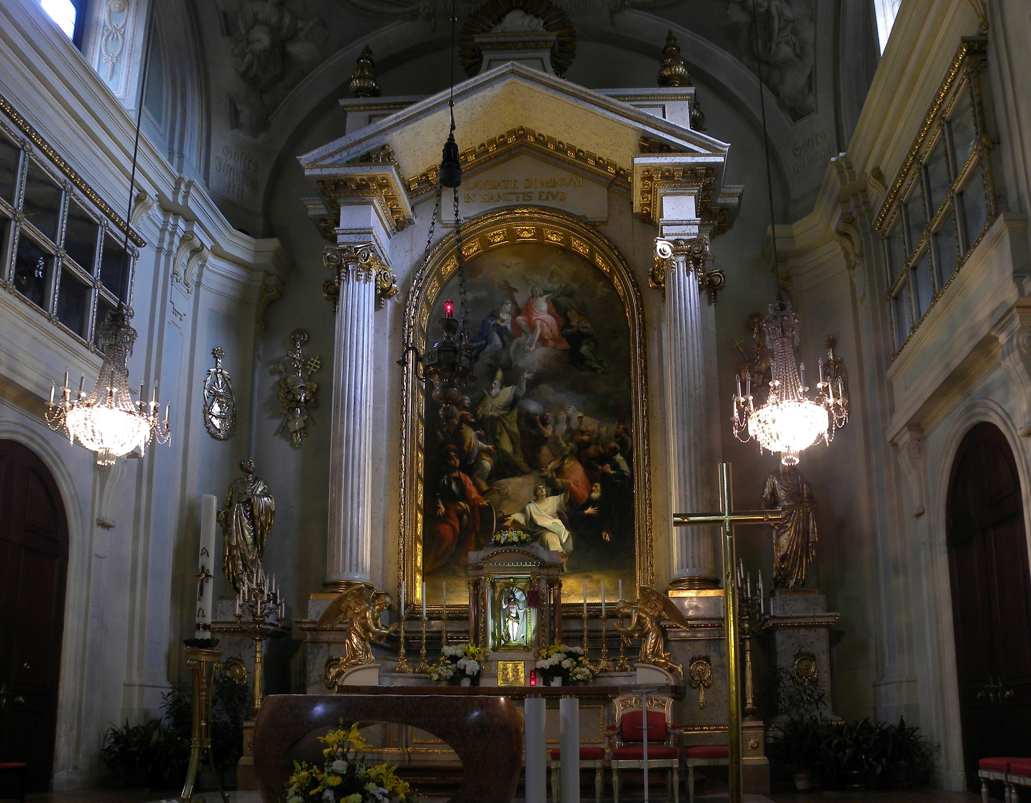 Die den hl. vierzehn Nothelfern gewidmete Pfarrkirche wurde in den Jahren 1712 bis 1718 erbaut und 1769 bis 1773 vergrößert. 1797 wurde Franz Schubert in dieser Kirche getauft und wurde auch künstlerisch hier tätig.